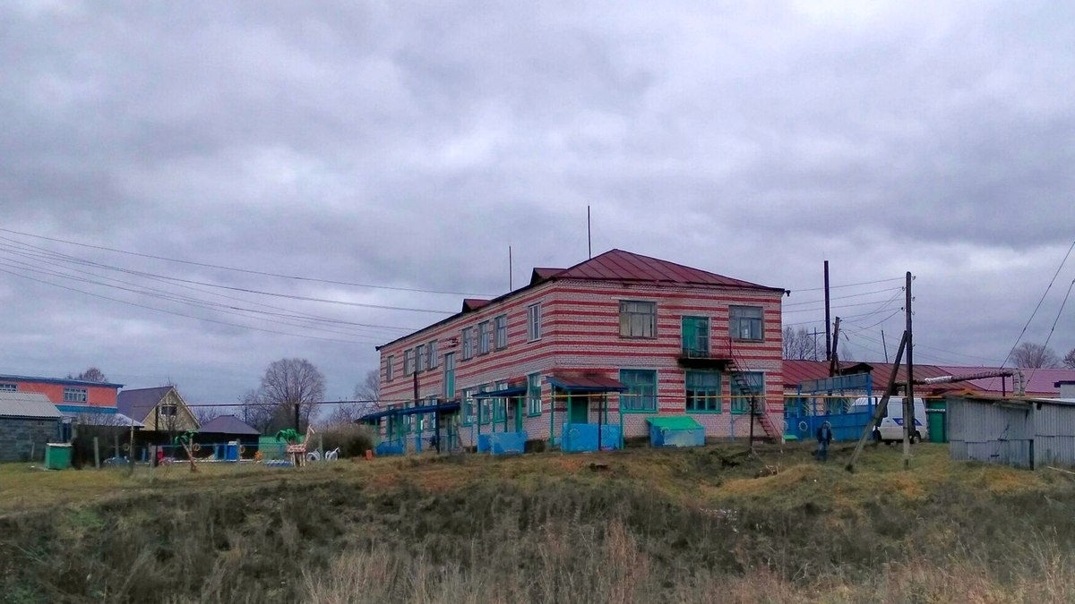 Детский сад в Кудеснерах